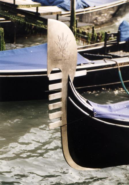 Bugbeschlag venezianischer Gondel